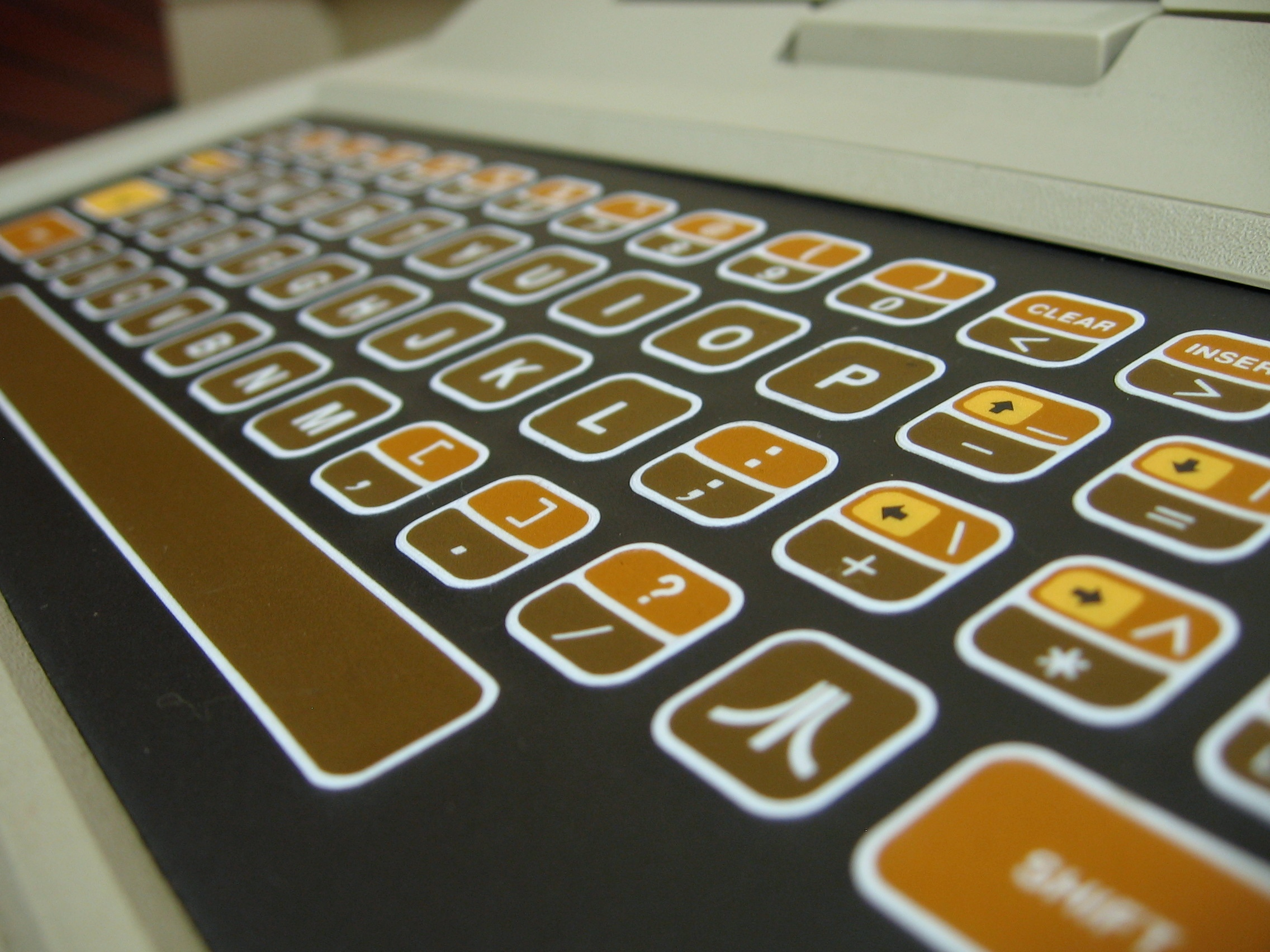 Atari 400 membrane keyboard (detail)